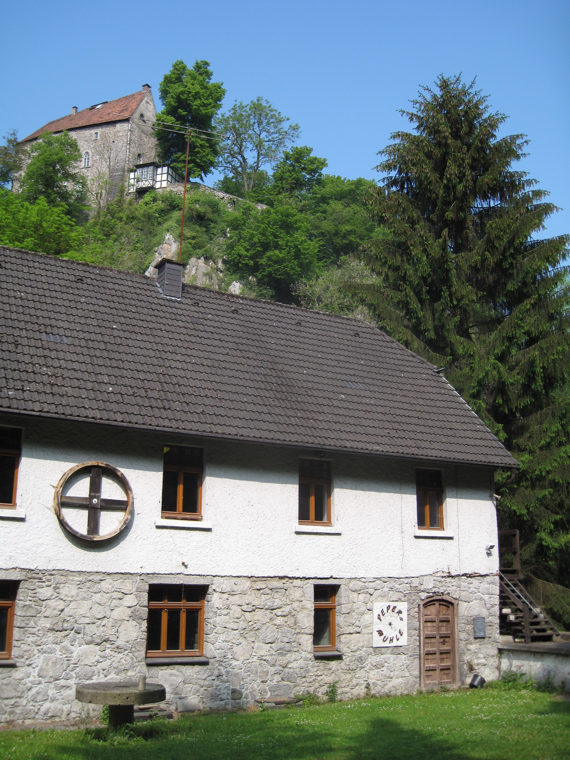 Ehemalige Mühlenanlage Klusenstein im Hönnetal in Balve. Denkmalschutz seit 25. Juni 1984. Im Hintergrund die auf Hemeraner Grund und Boden stehende Burg Klusenstein.